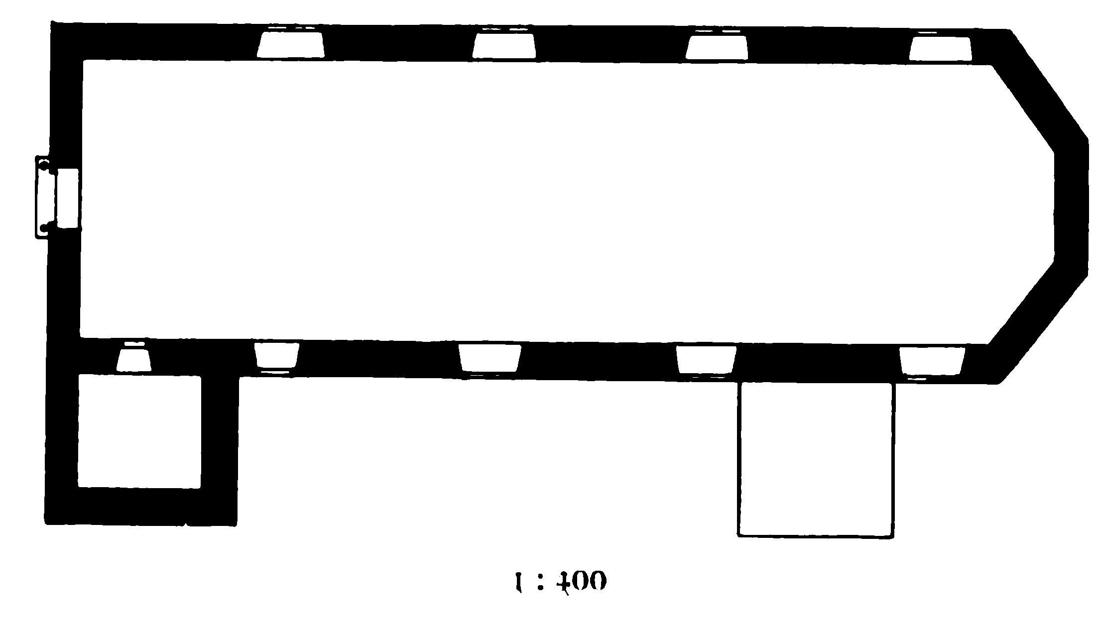 Grundriss der Kirche St. Jakobus in Mastholte, Stadt Rietberg